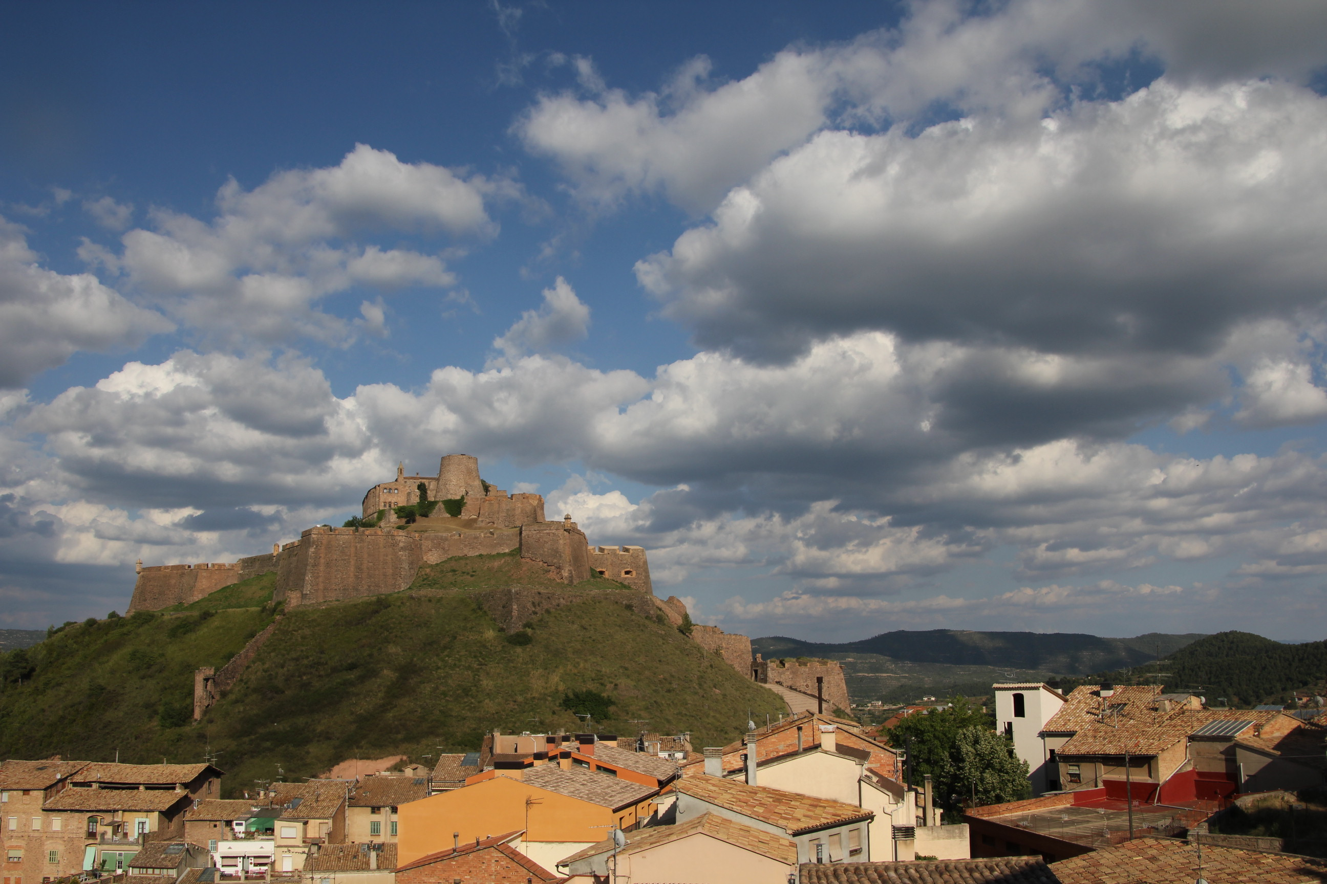 Castell de Cardona